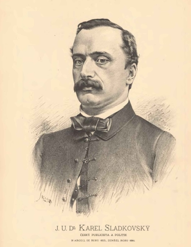 Portréty českých osobností od Jana Vilímka